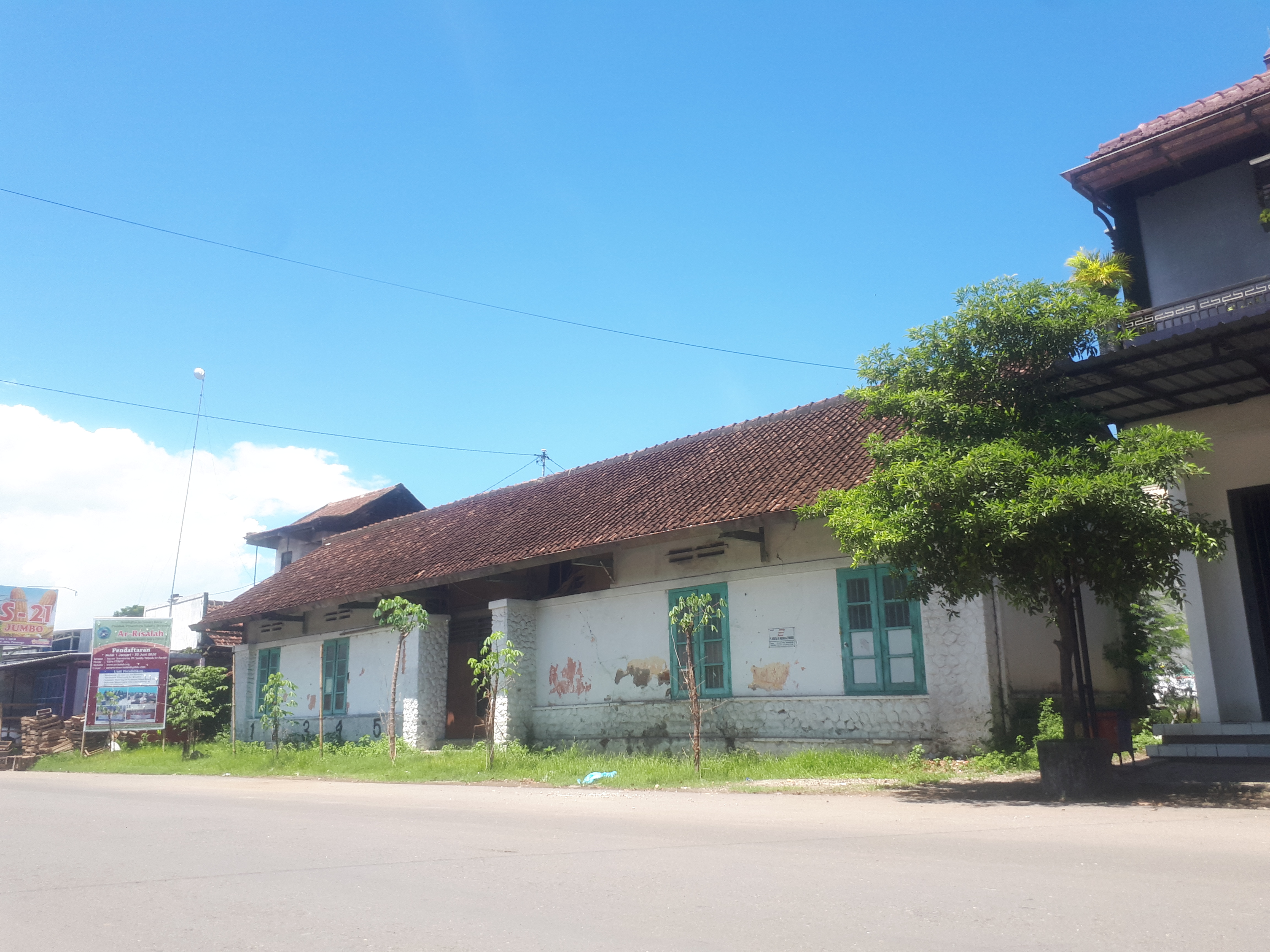 Tampak luar bangunan Stasiun Jetis, salah satu stasiun nonaktif di Kabupaten Ponorogo